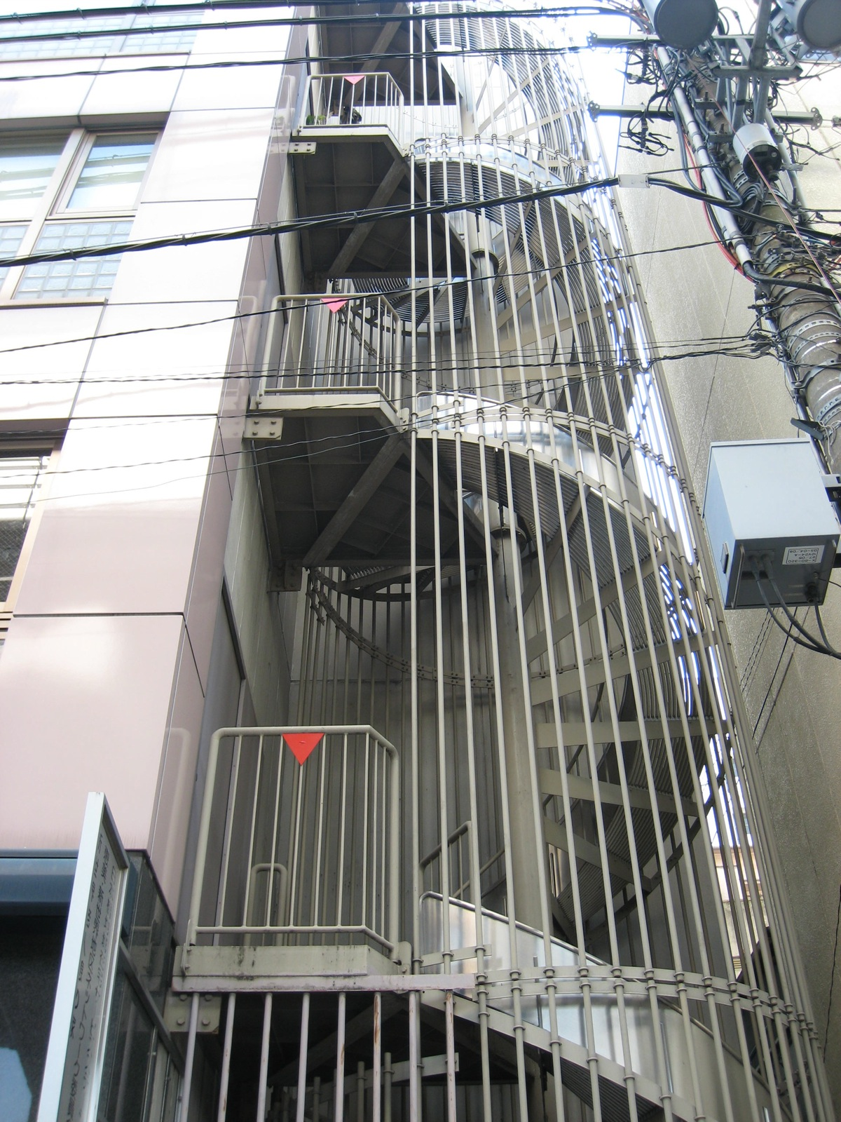 fire-escape slide